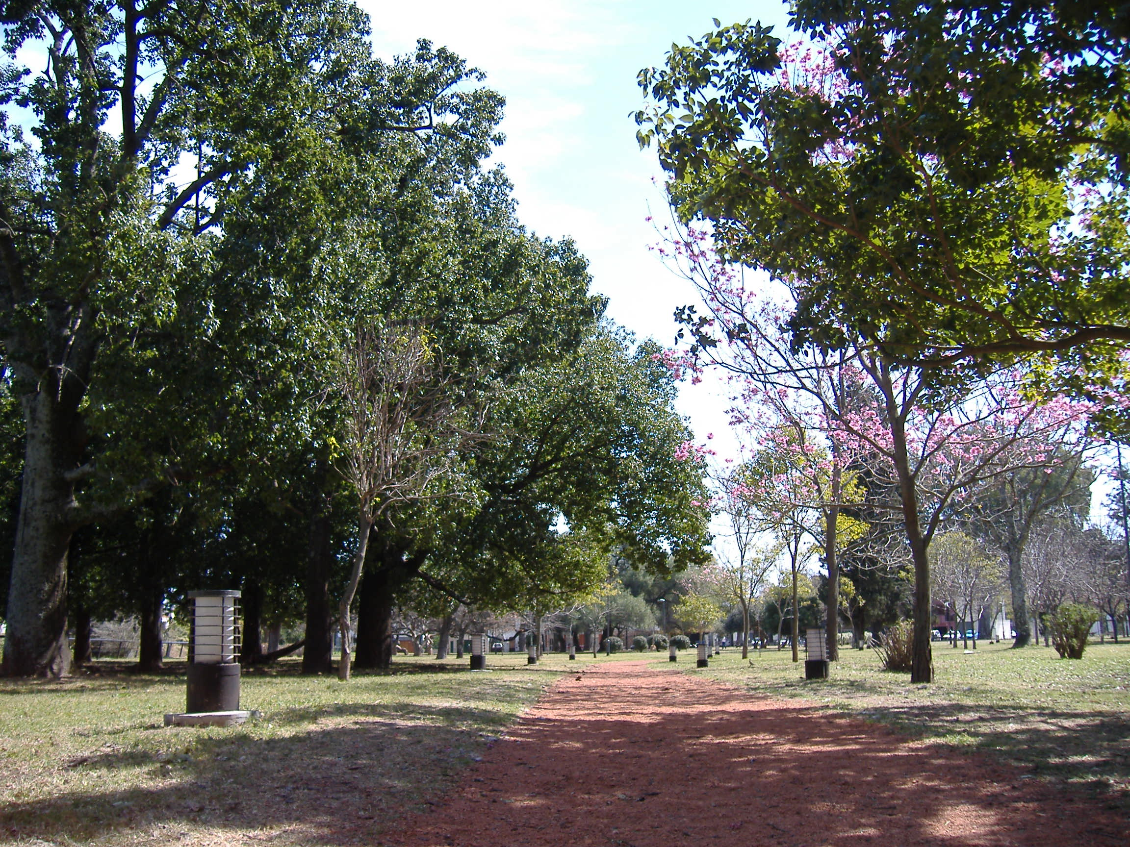 Parque Urquiza, an urban park in Rosario, Argentina.